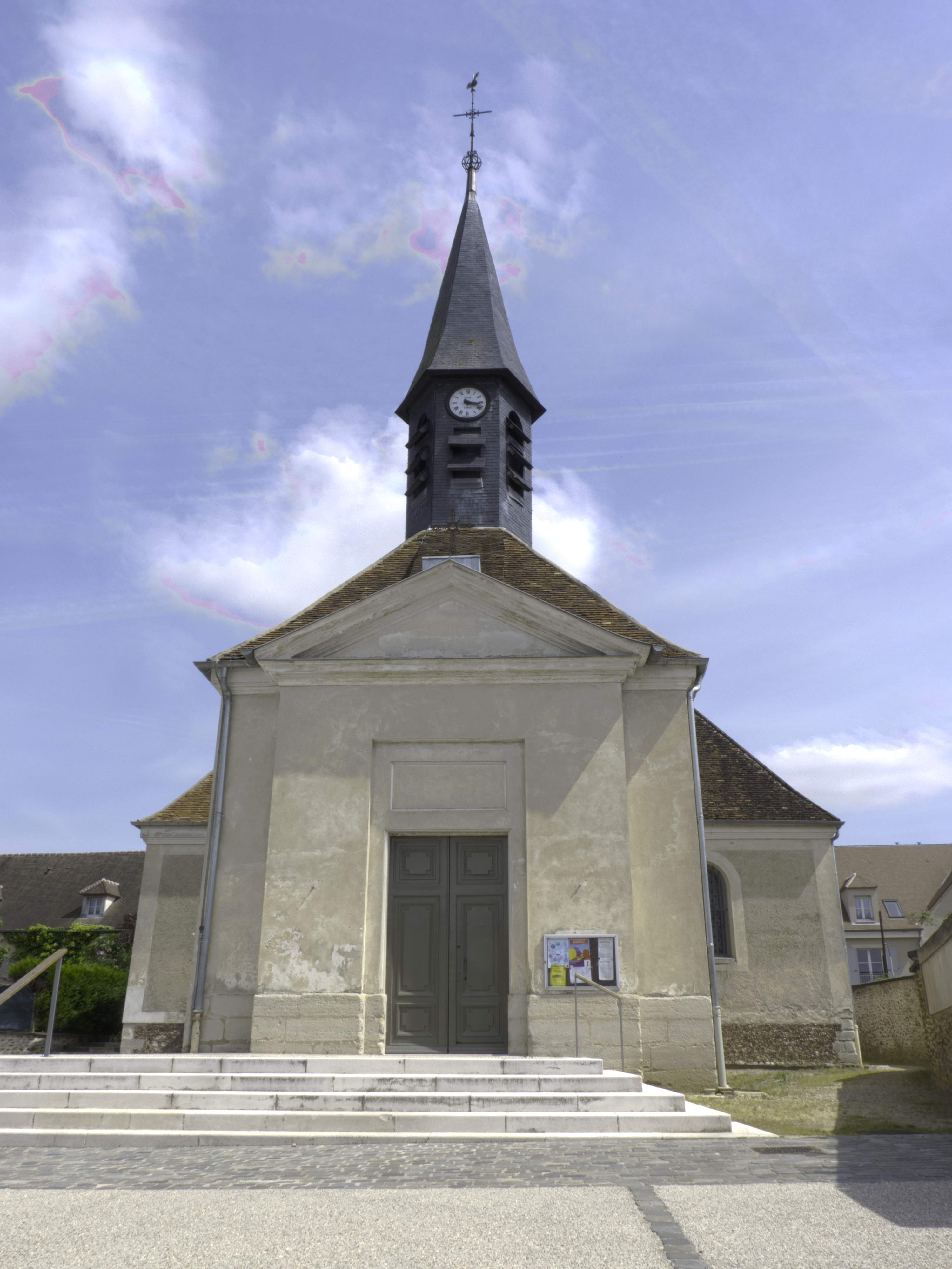 Église de Périgny, Val-de-Marne